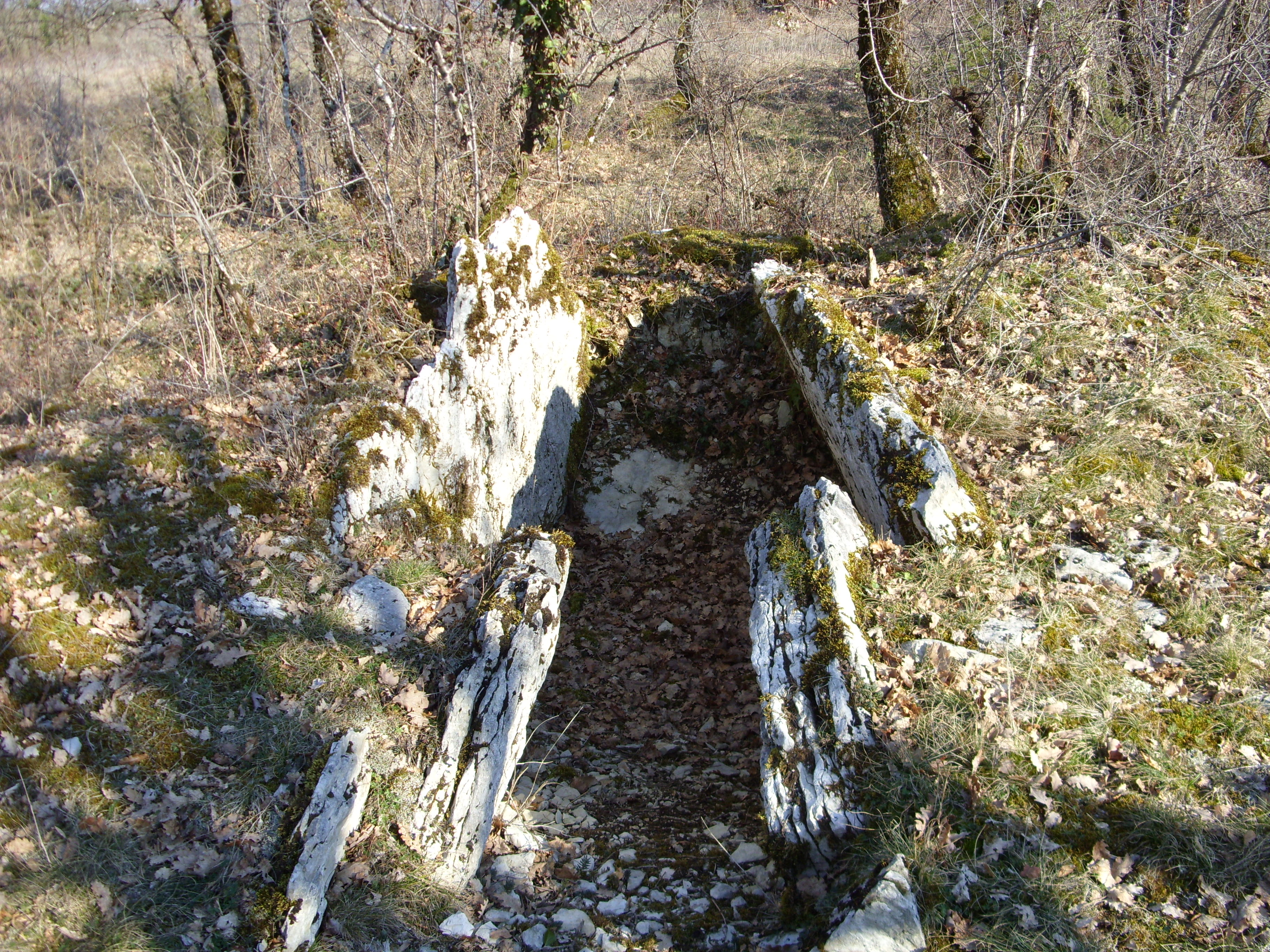 La table ( la dalle supérieure ) a malheureusement disparu.